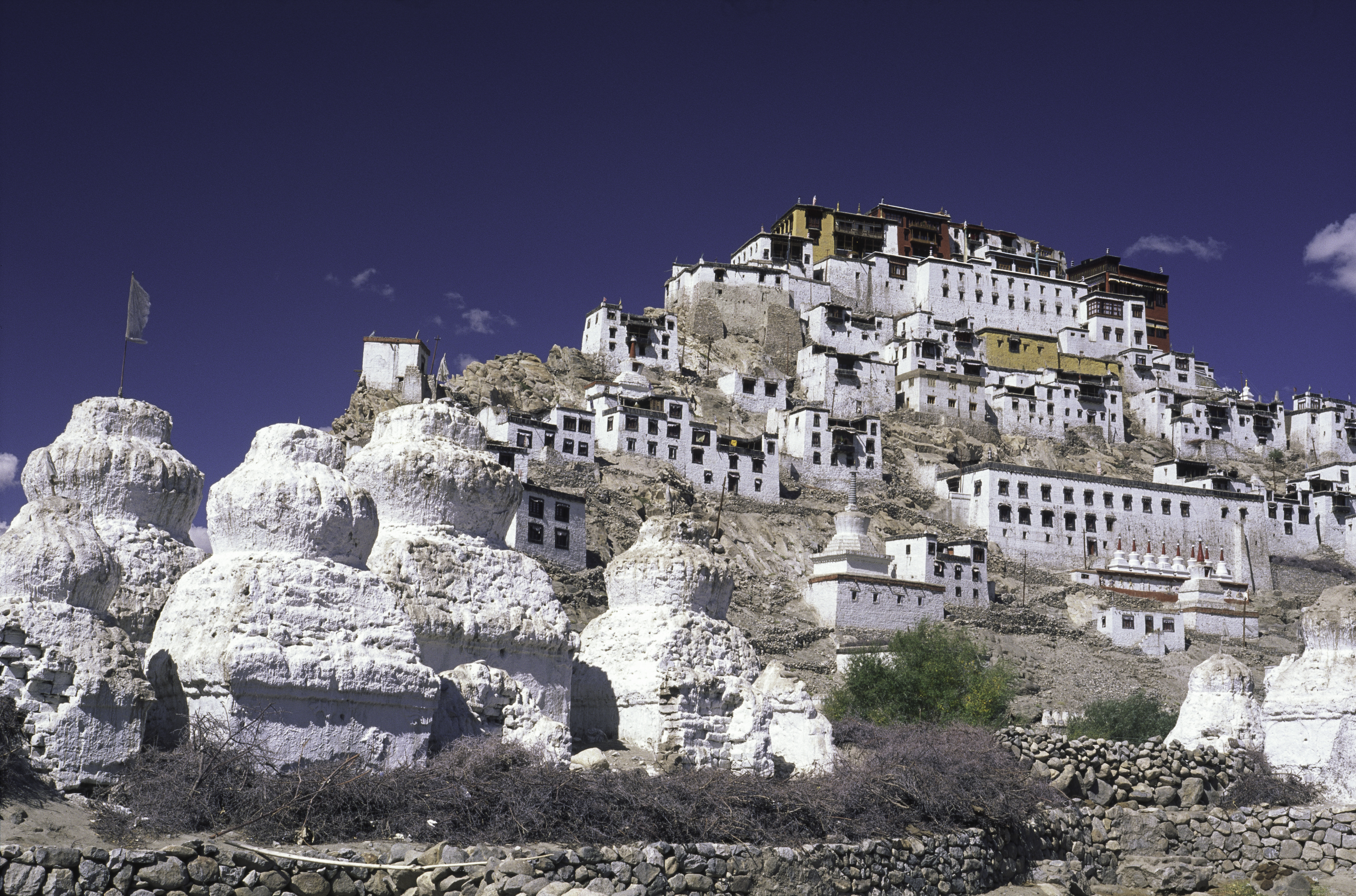 Thikse, Ladakh, India